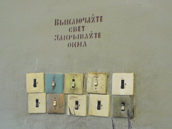 Типичные советские выключатели